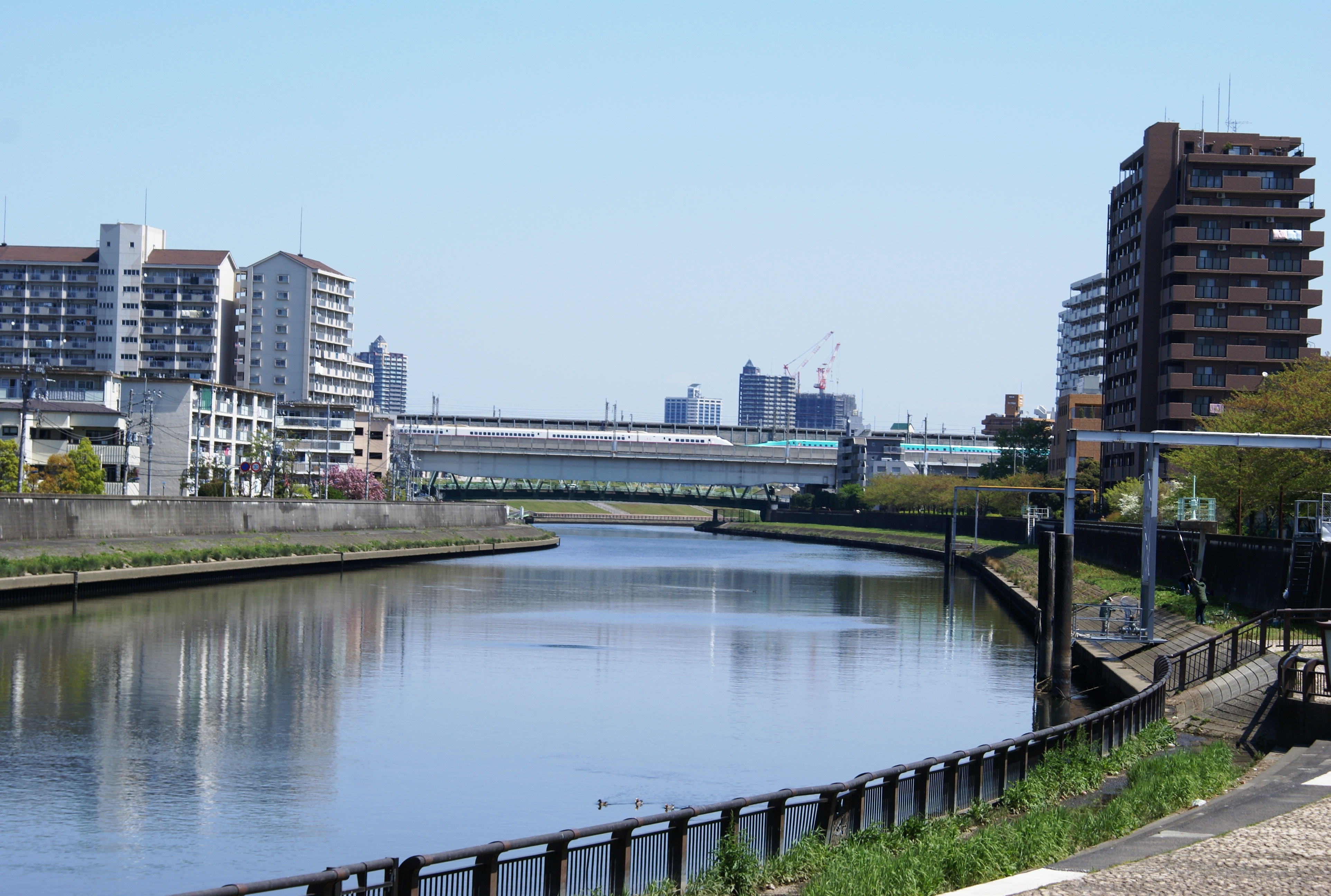 小豆沢公園の新河岸川